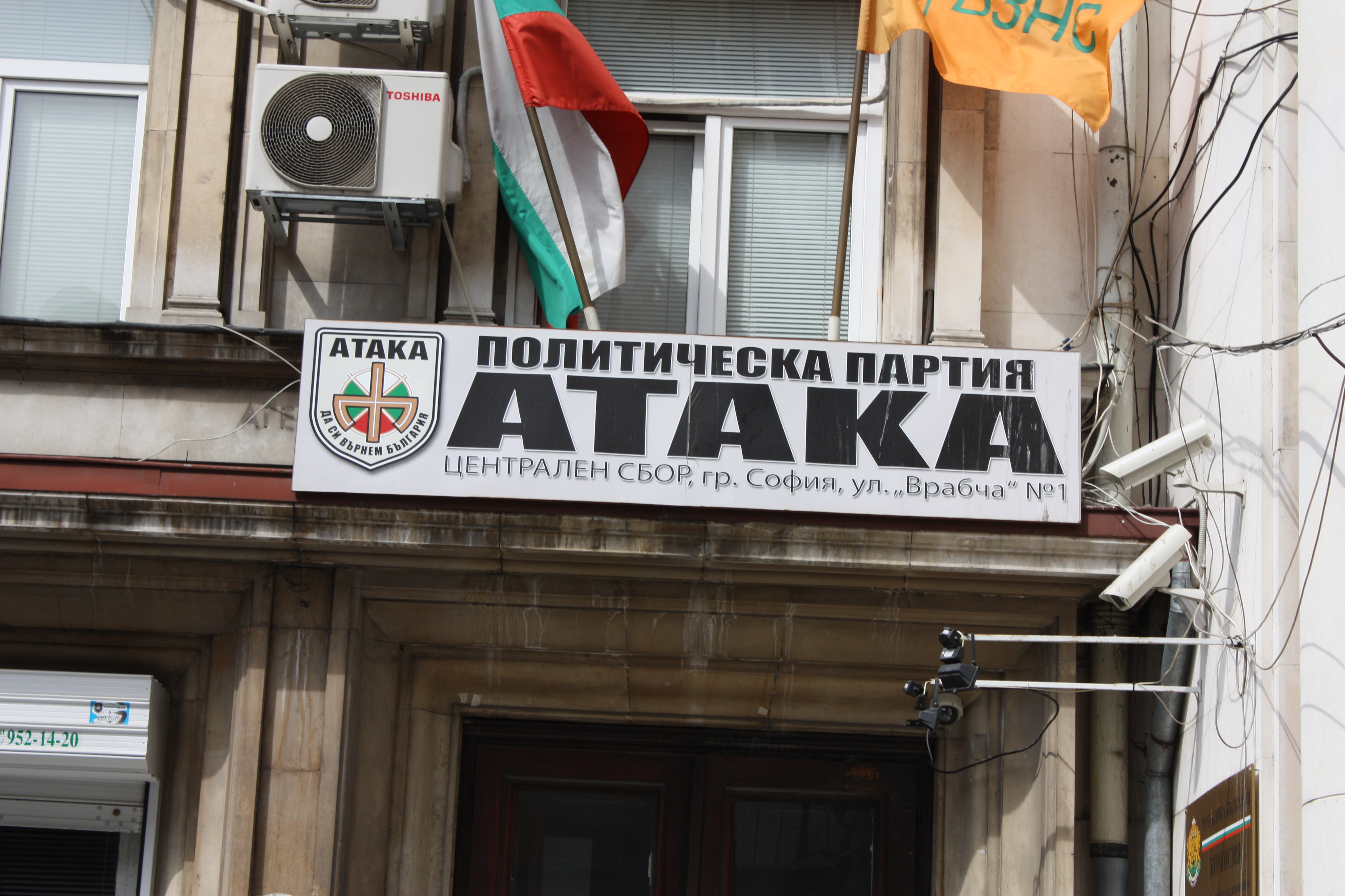 Büro der Partei Ataka, neben der National Opera and Ballet, Sofia, Bulgarien, daneben das Stambolijski-Denkmal